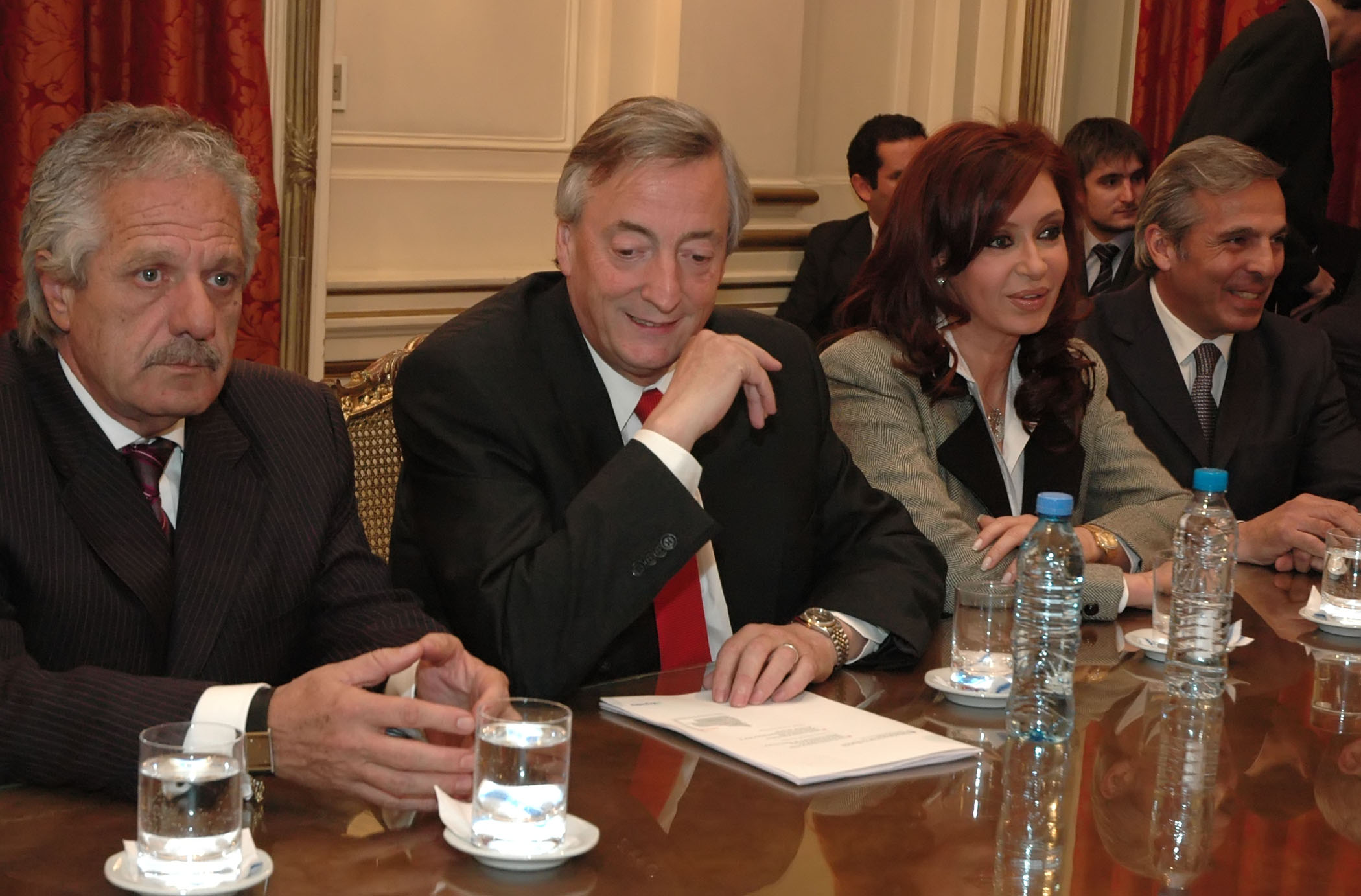 El presidente Kirchner junto a la senadora Cristina Fernández de Kirchner, el gobernador de Río Negro Miguel Ángel Saiz, y el gobernador electo de Neuquén, Jorge Sapag.